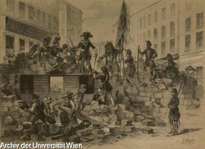 Barrikade der Akademischen Legion gegenüber dem alten Mautgebäude (Postgasse)